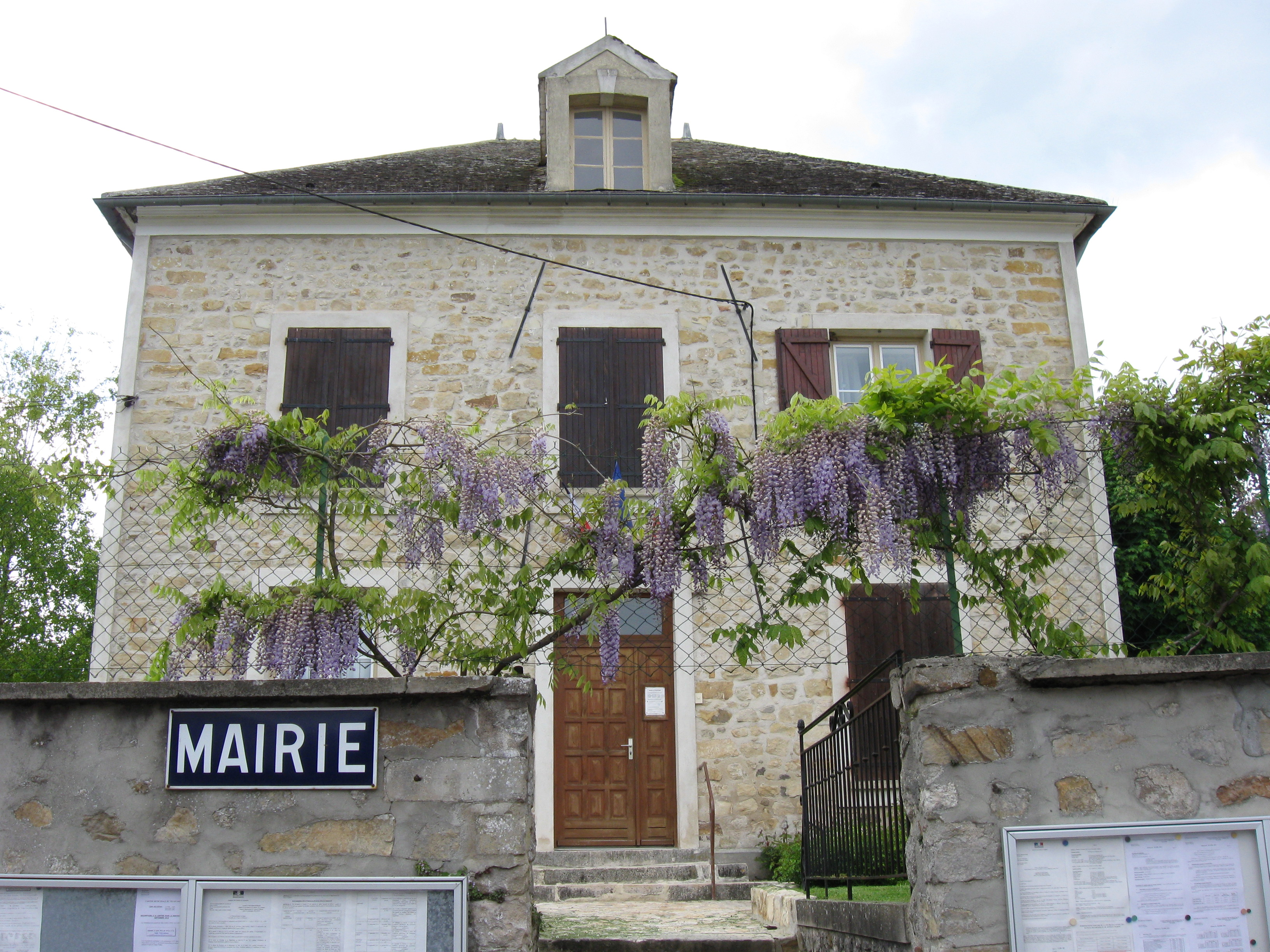 Mairie de Villecerf (département de la Seine et Marne, région Île-de-France).